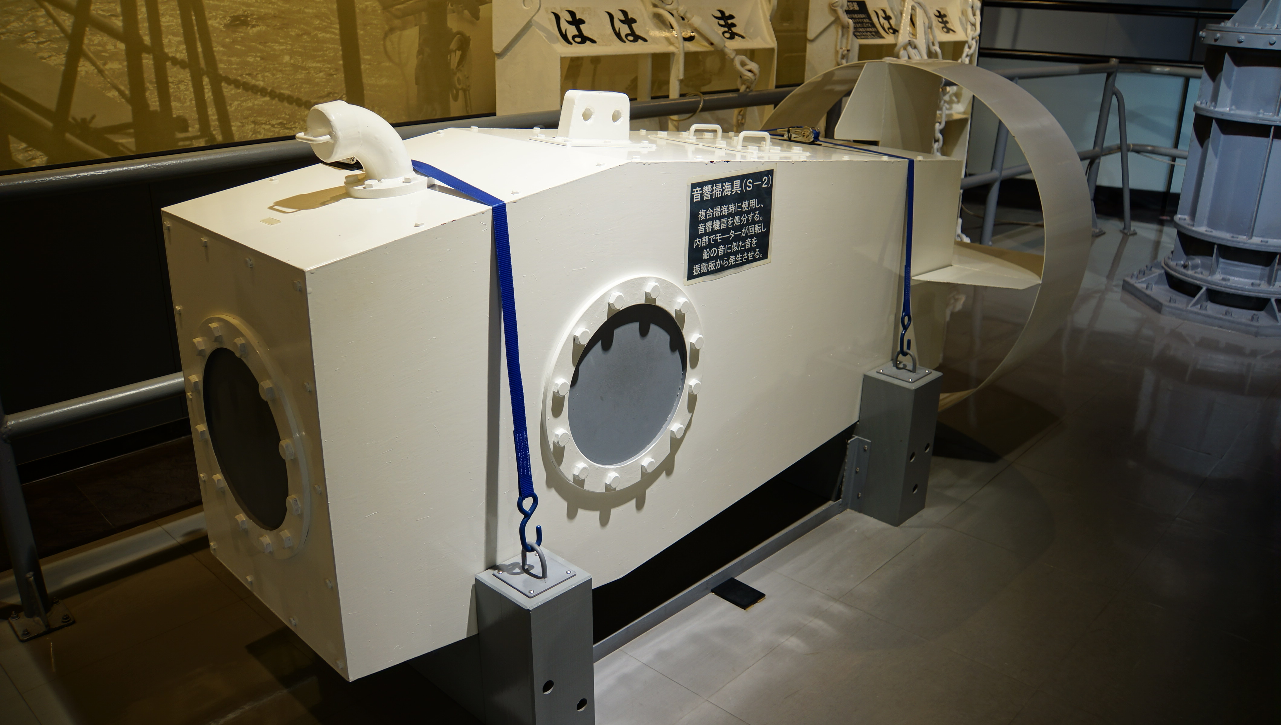 海上自衛隊 音響掃海具S-2。 14年9月15日 海上自衛隊呉史料館内にて。